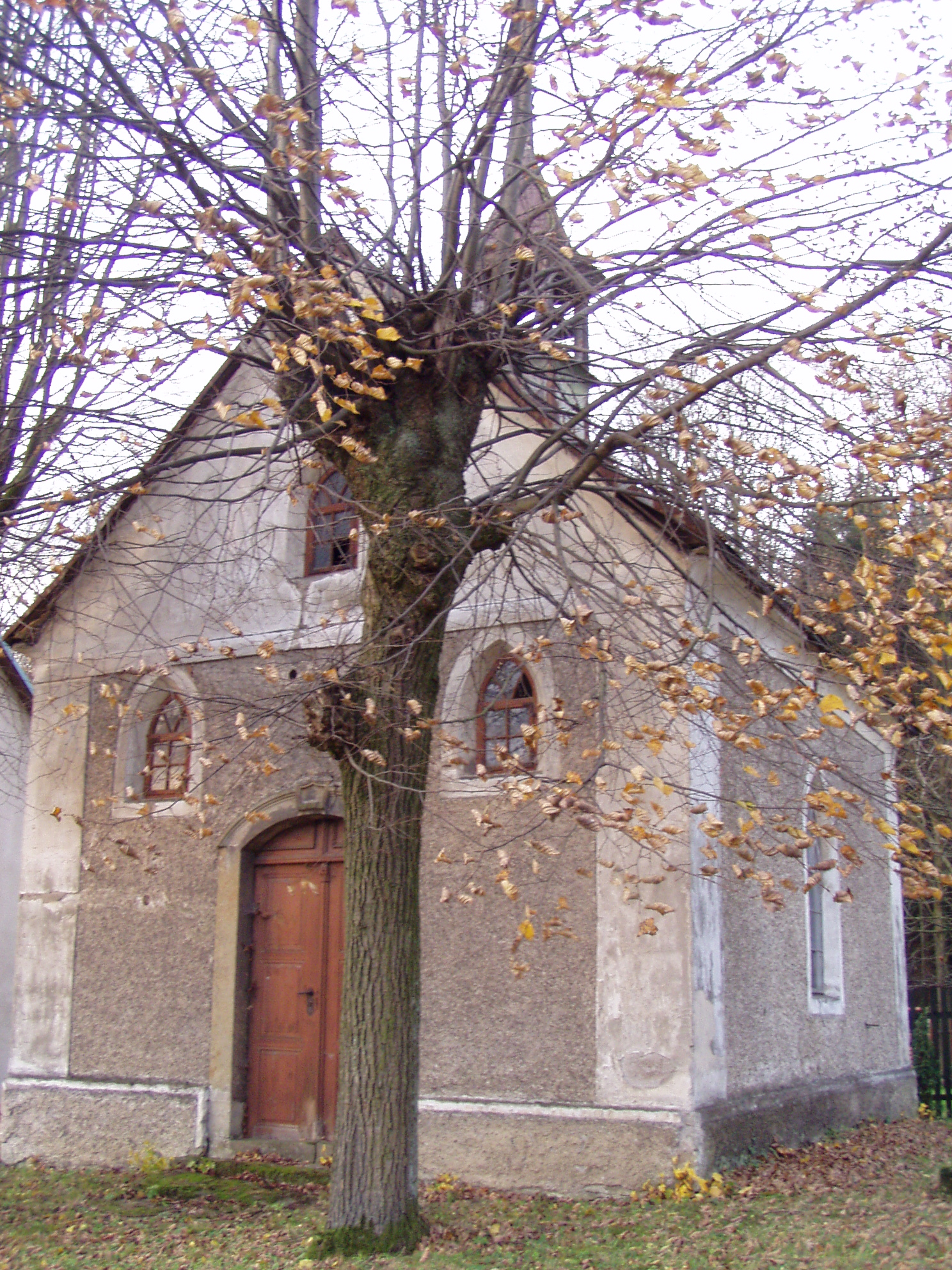 Kaple Nejsvětější Trojice (Chábory)